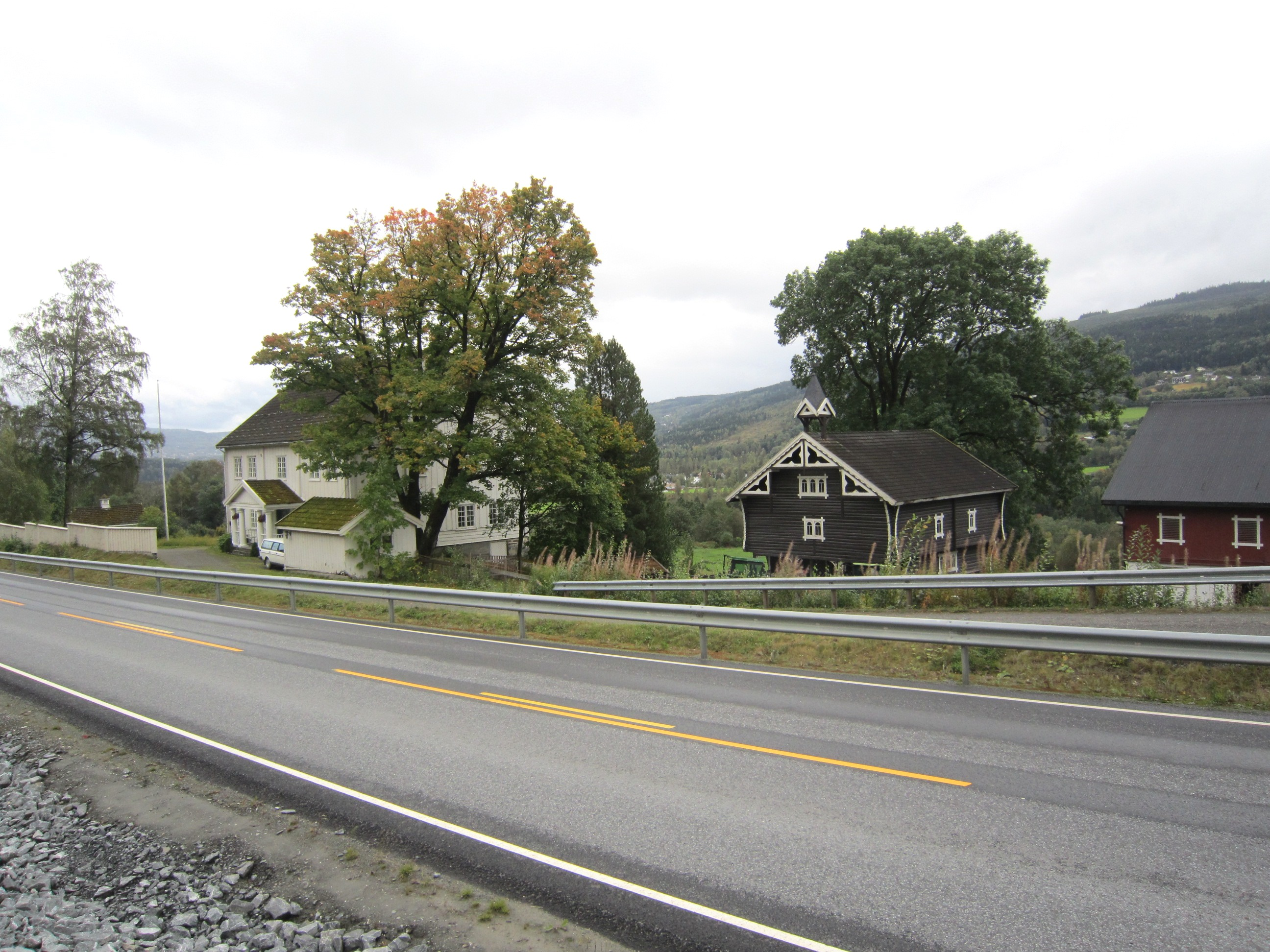 Primær fylkesvei 255 ved Fåberg prestegård